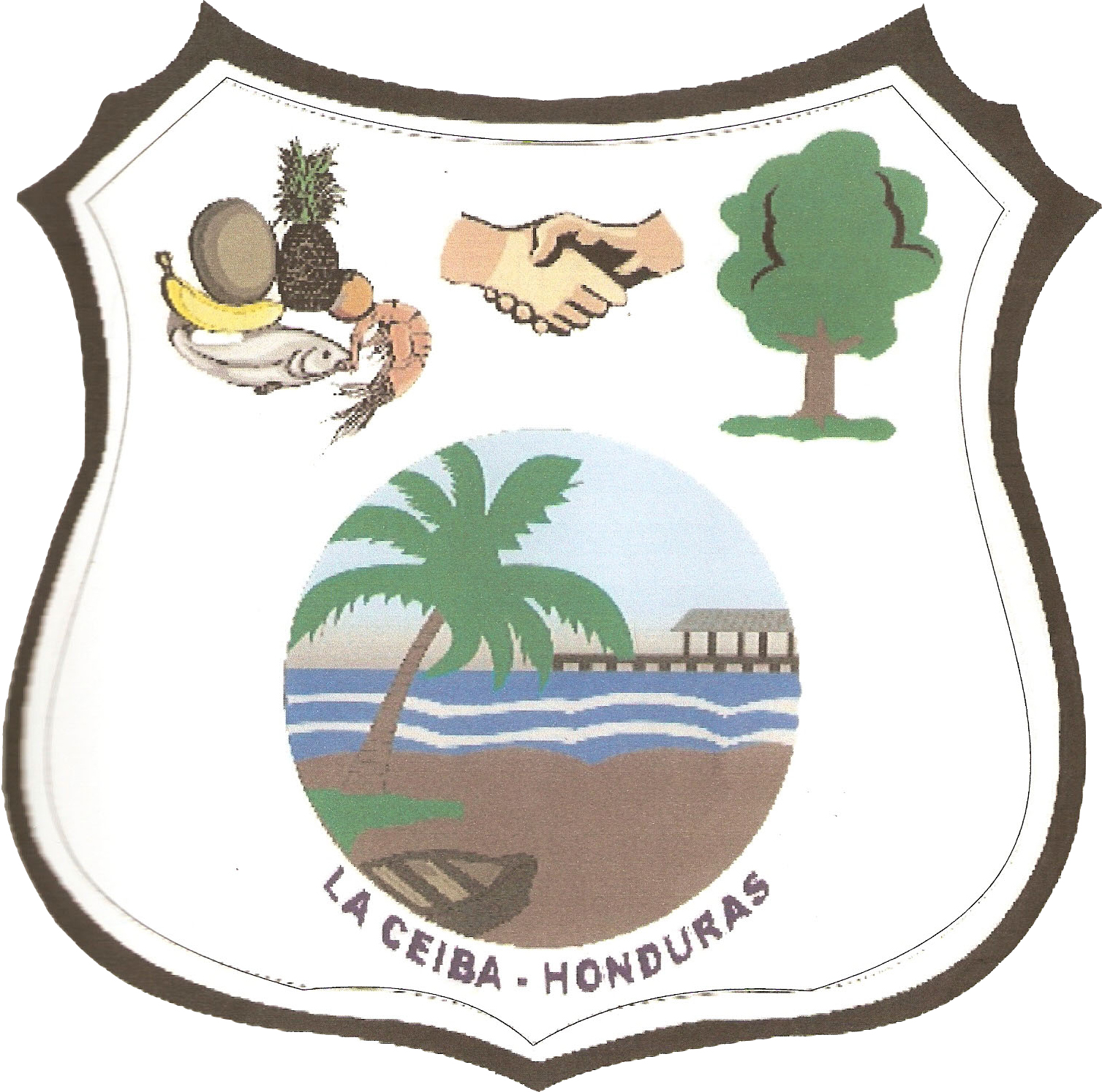 Escudo oficial de La Ceiba